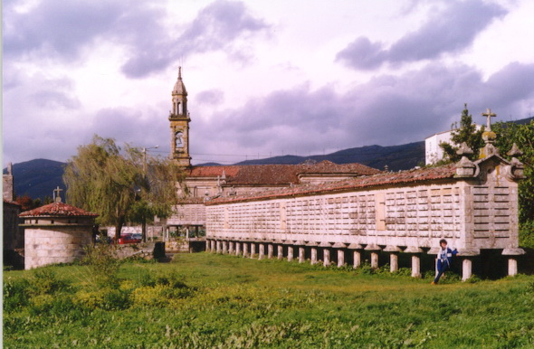 Hórreo de Carnota, uno de los más grandes de España.